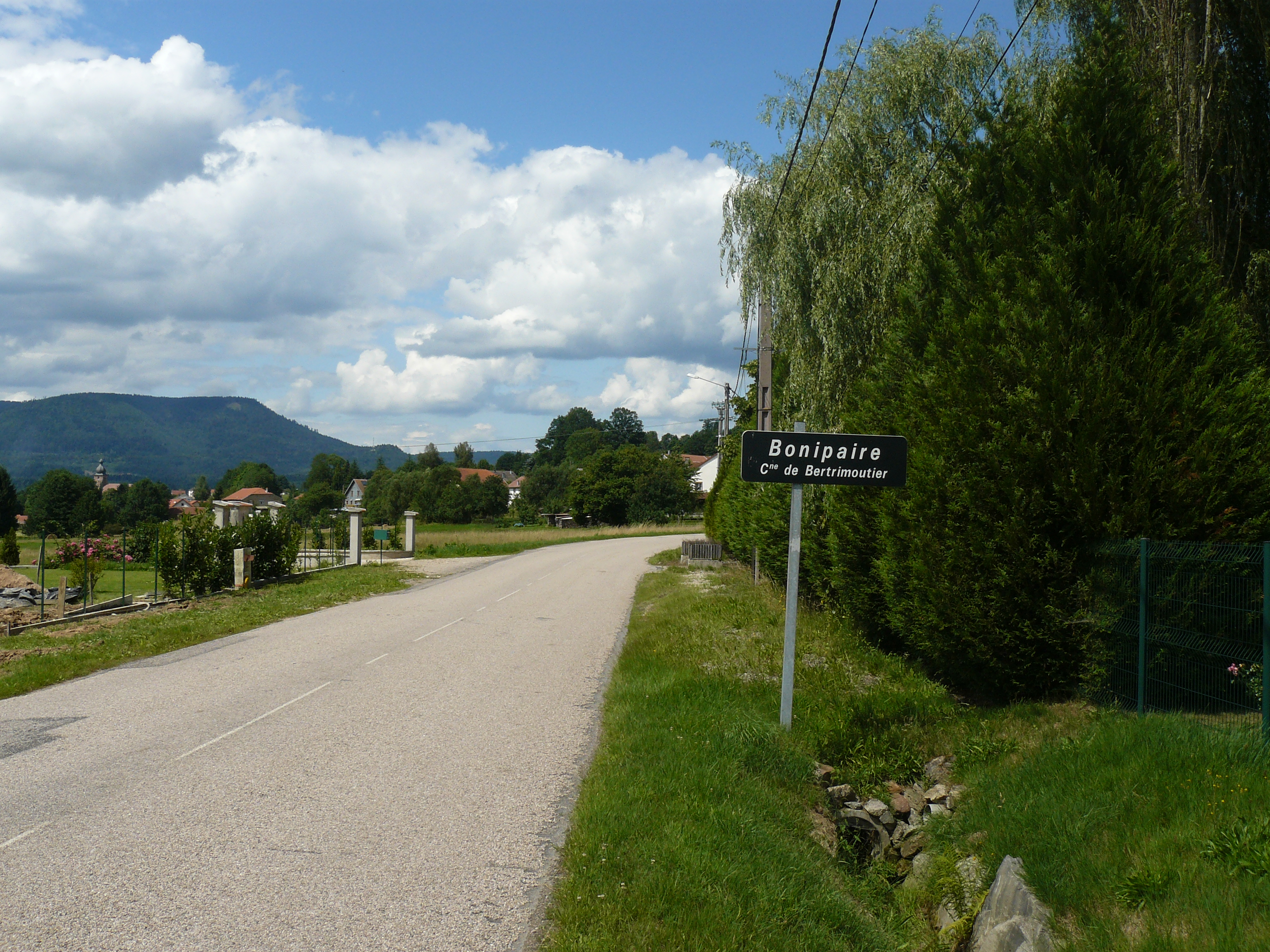 Le hameau de Bonipaire à Bertrimoutier